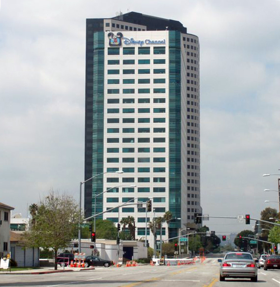 Sede da Disney Channel em Brubank, Califórnia, Estados Unidos.